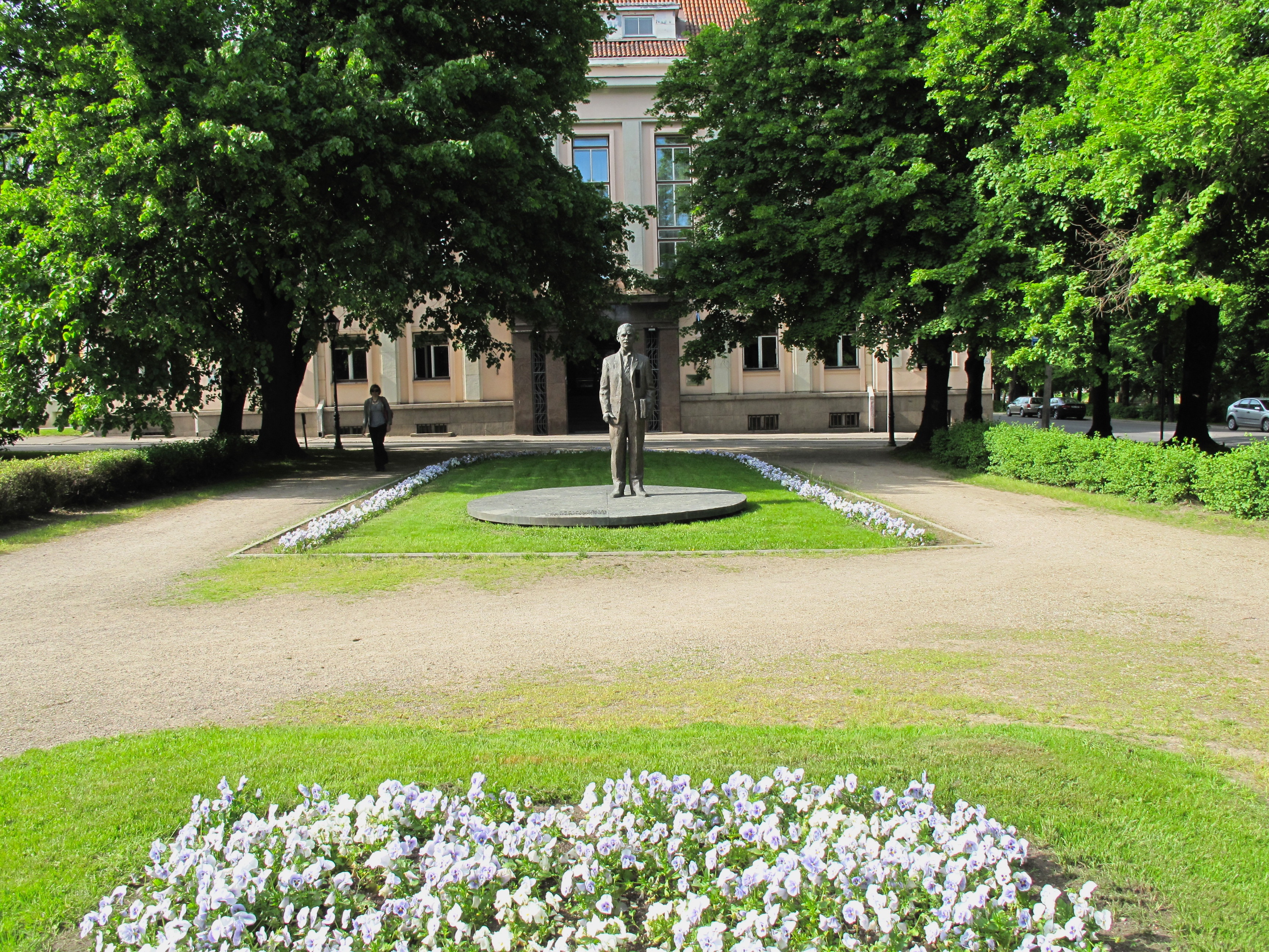 Politseiplats, taamal haridusministeerium